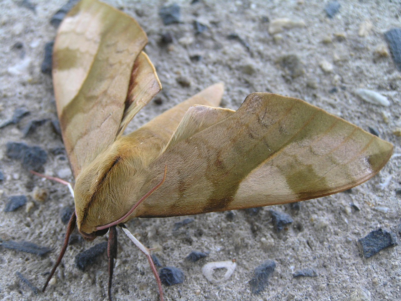 トビイロスズメ_Clanis bilineata tsingtauica_Mell